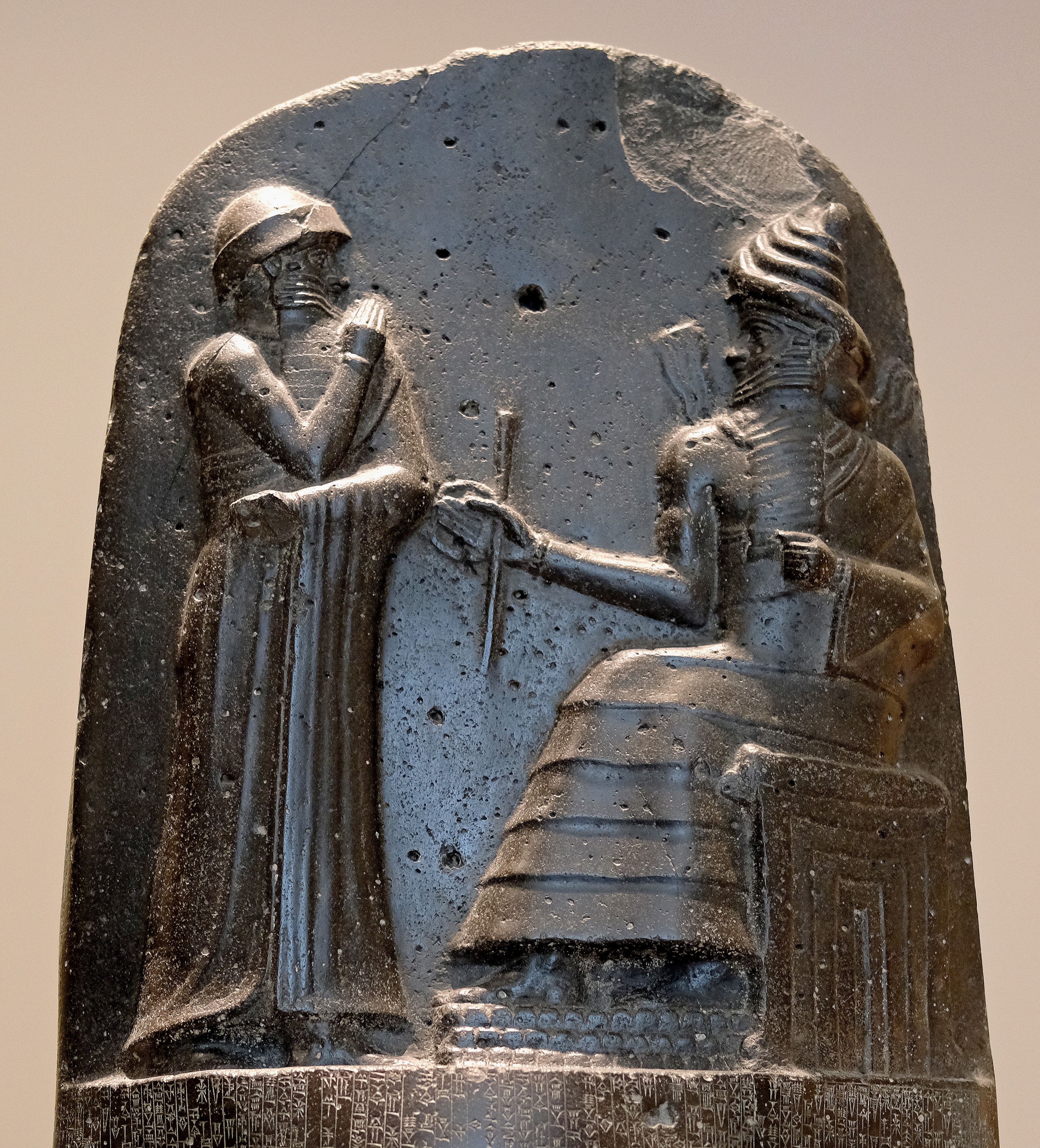 Code de Hammurabi, roi de Babylone ; face avant, bas-relief.